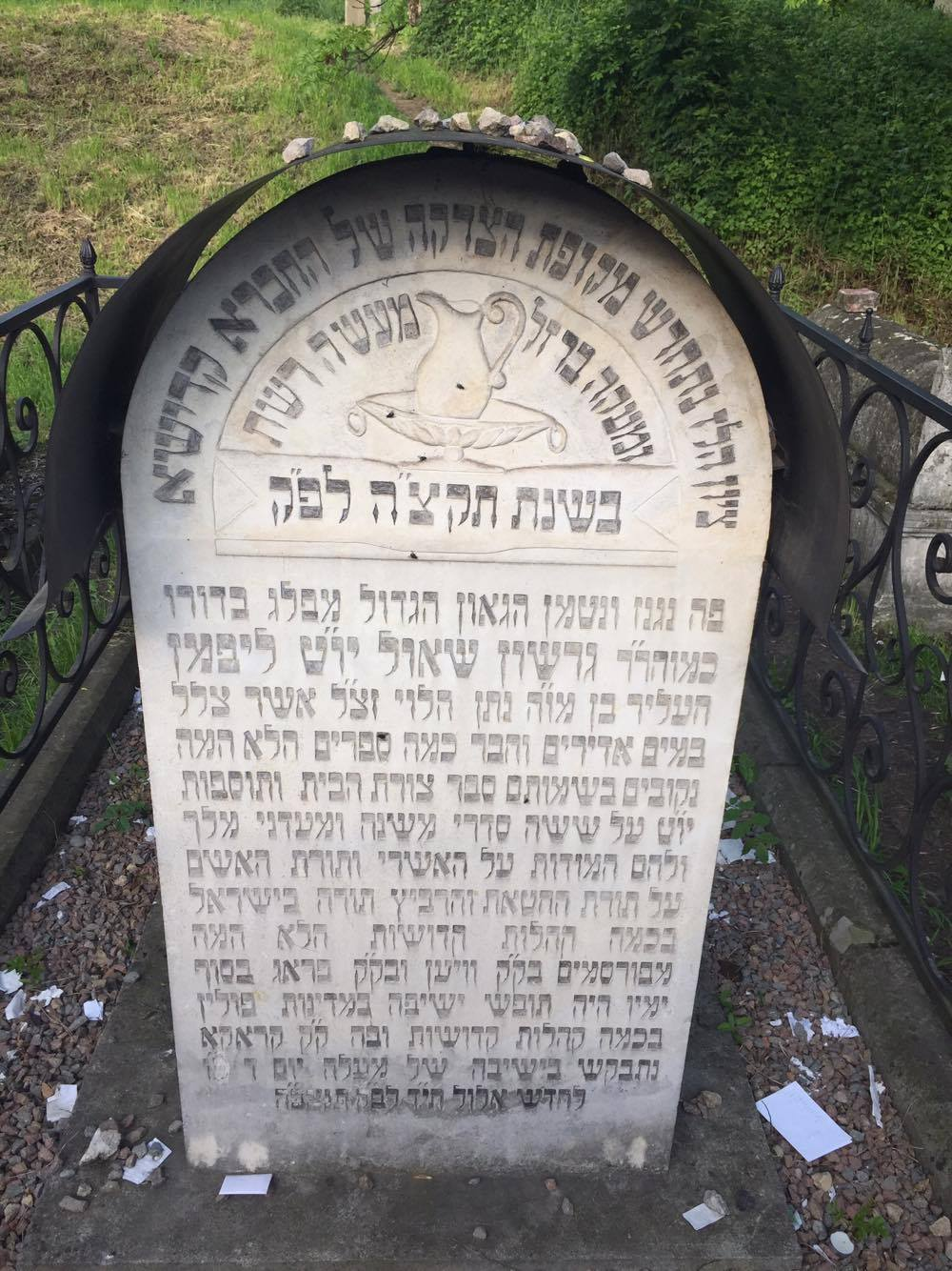 Kever of Yom Tov Lipmann Heller